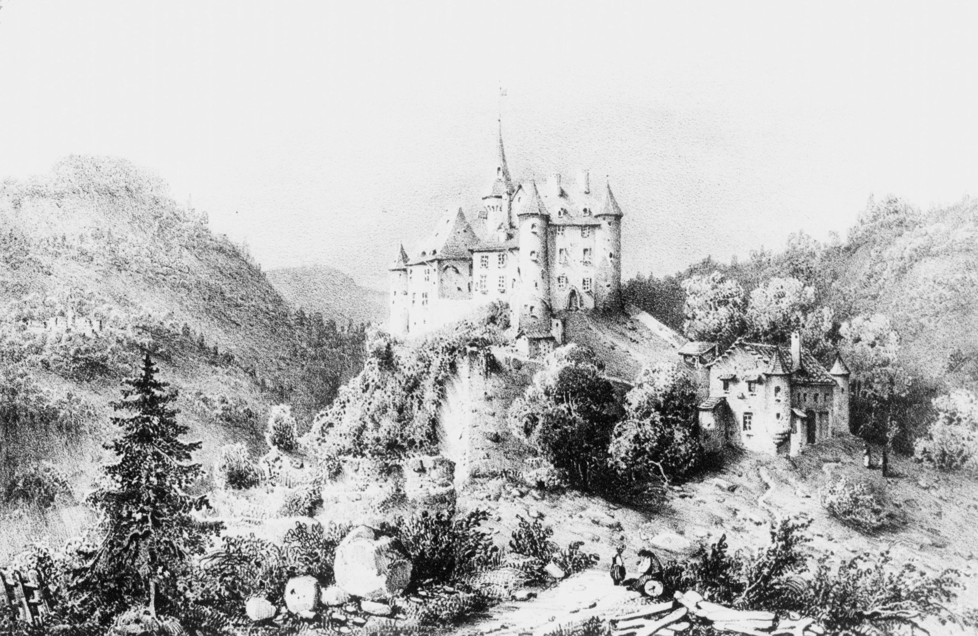 Album du Dauphiné, ou Recueil de dessins représentant les sites les plus pittoresques du Dauphiné.